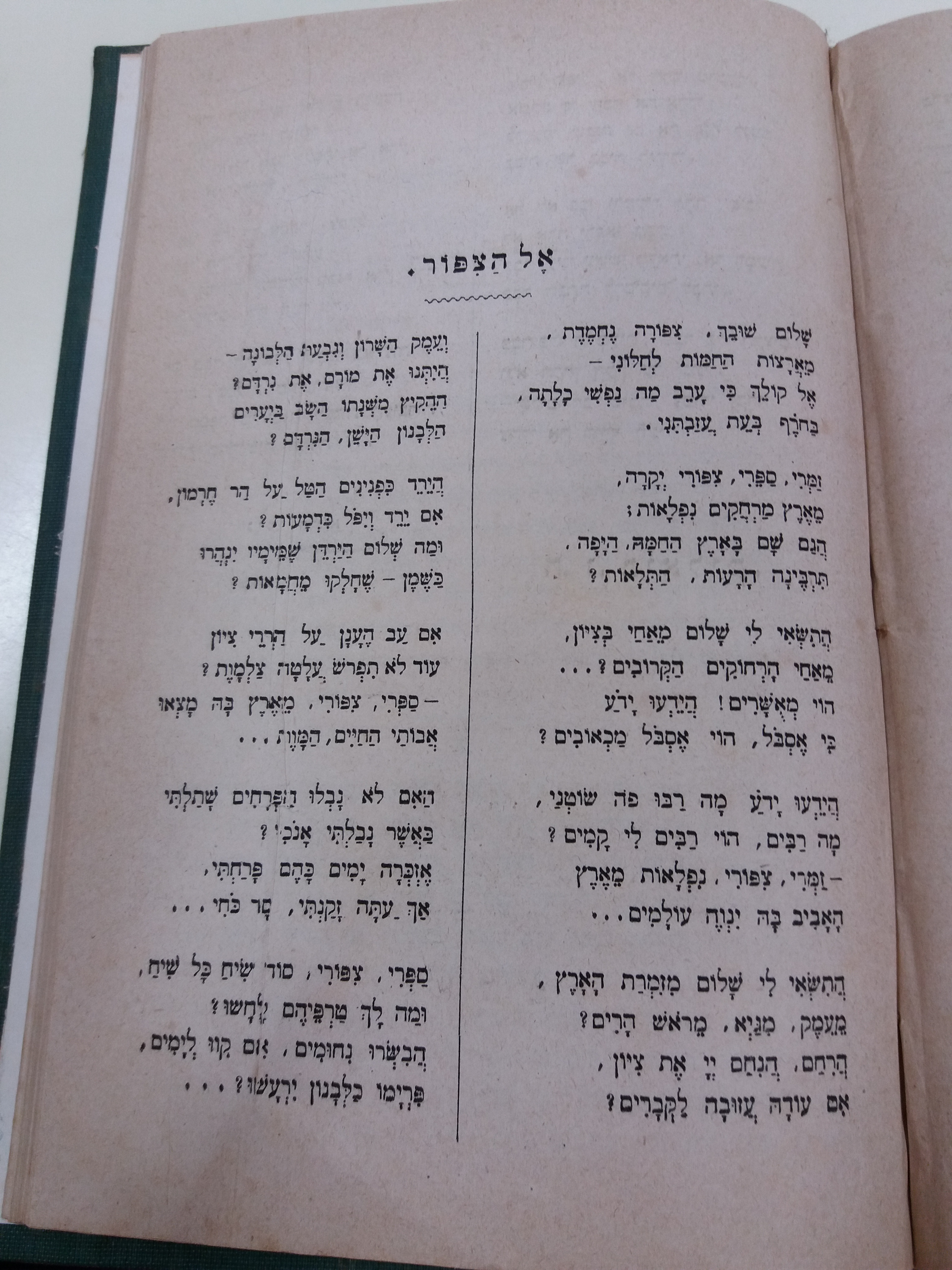 פרסום שירו הראשון של ביאליק בכתב העת פרדס